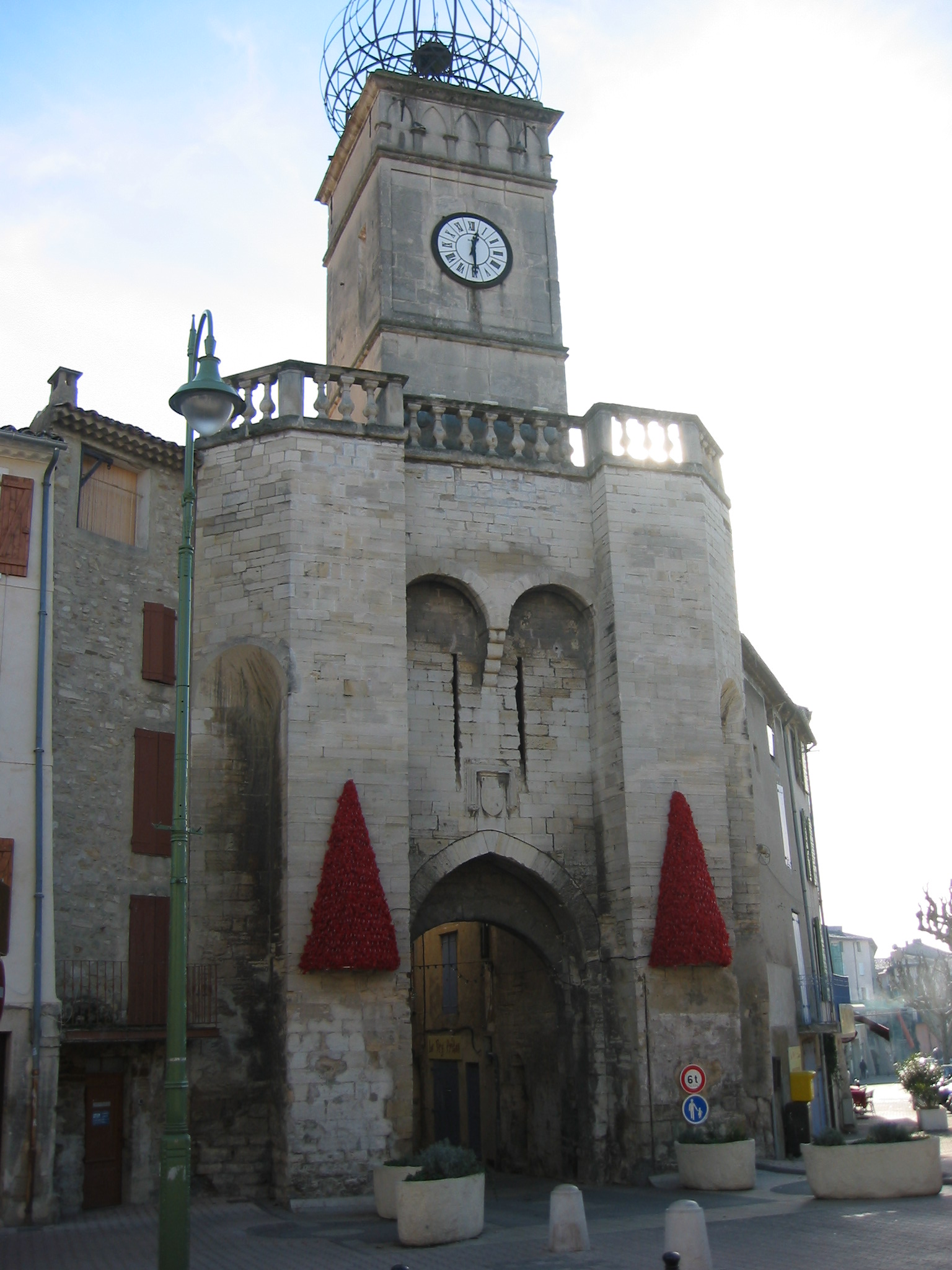 Manosque, en Provence (Alpes-de-Haute-Provence, France) Porte de Soubeyran (1830)